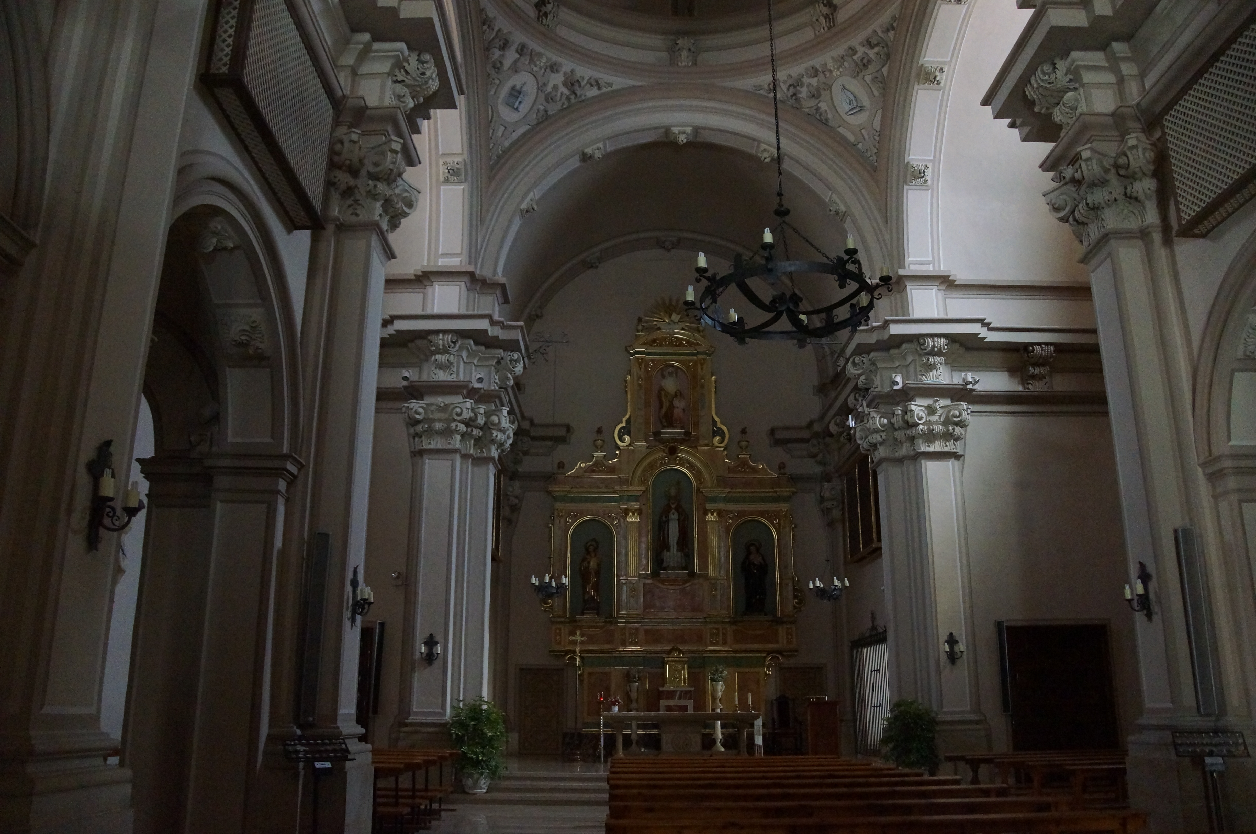 Monestir de Santa Anna (Sant Mateu) 03.100-001.